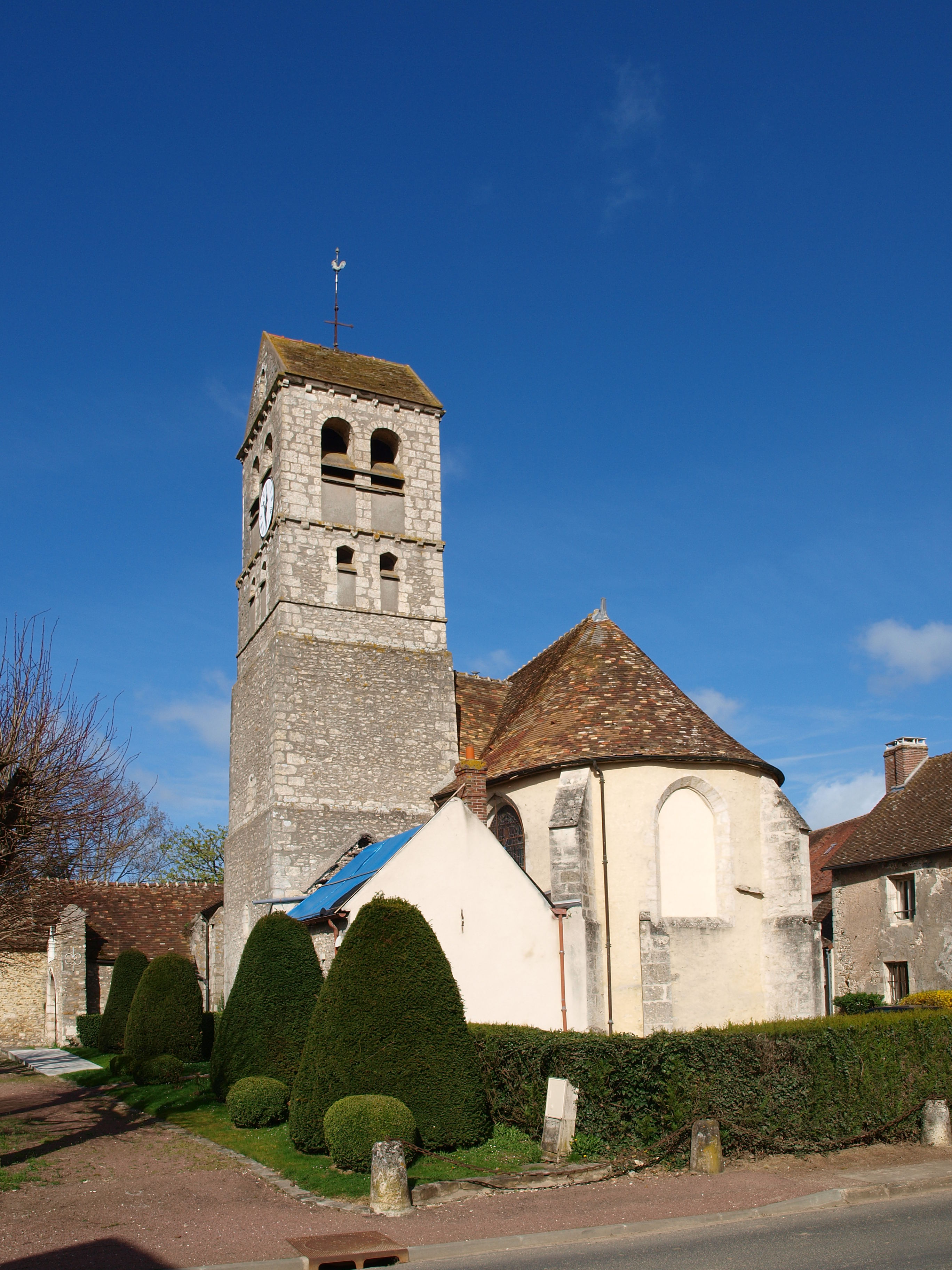 Allainville-aux-Bois (Yvelines, France) , église.